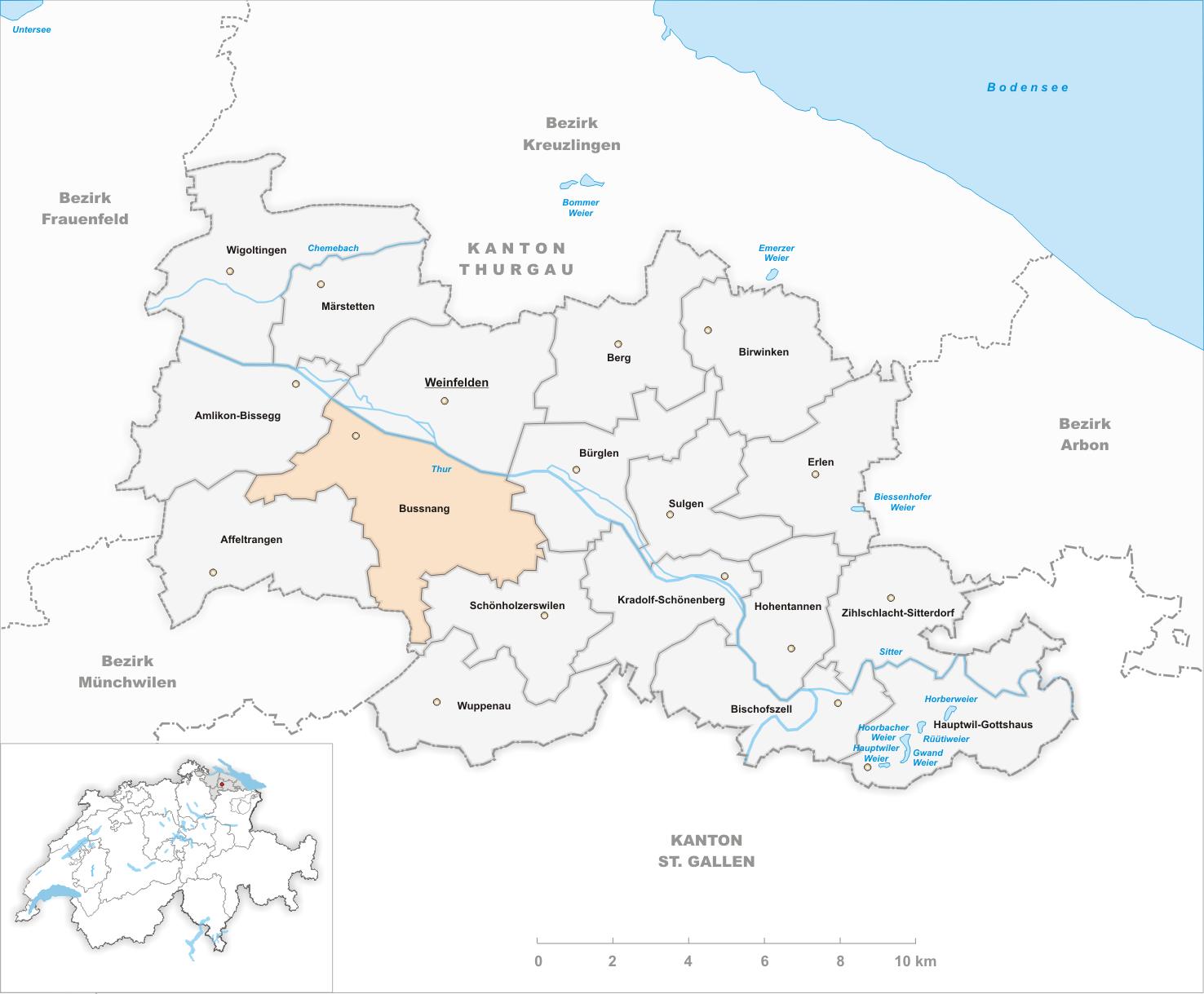 Municipality Bussnang